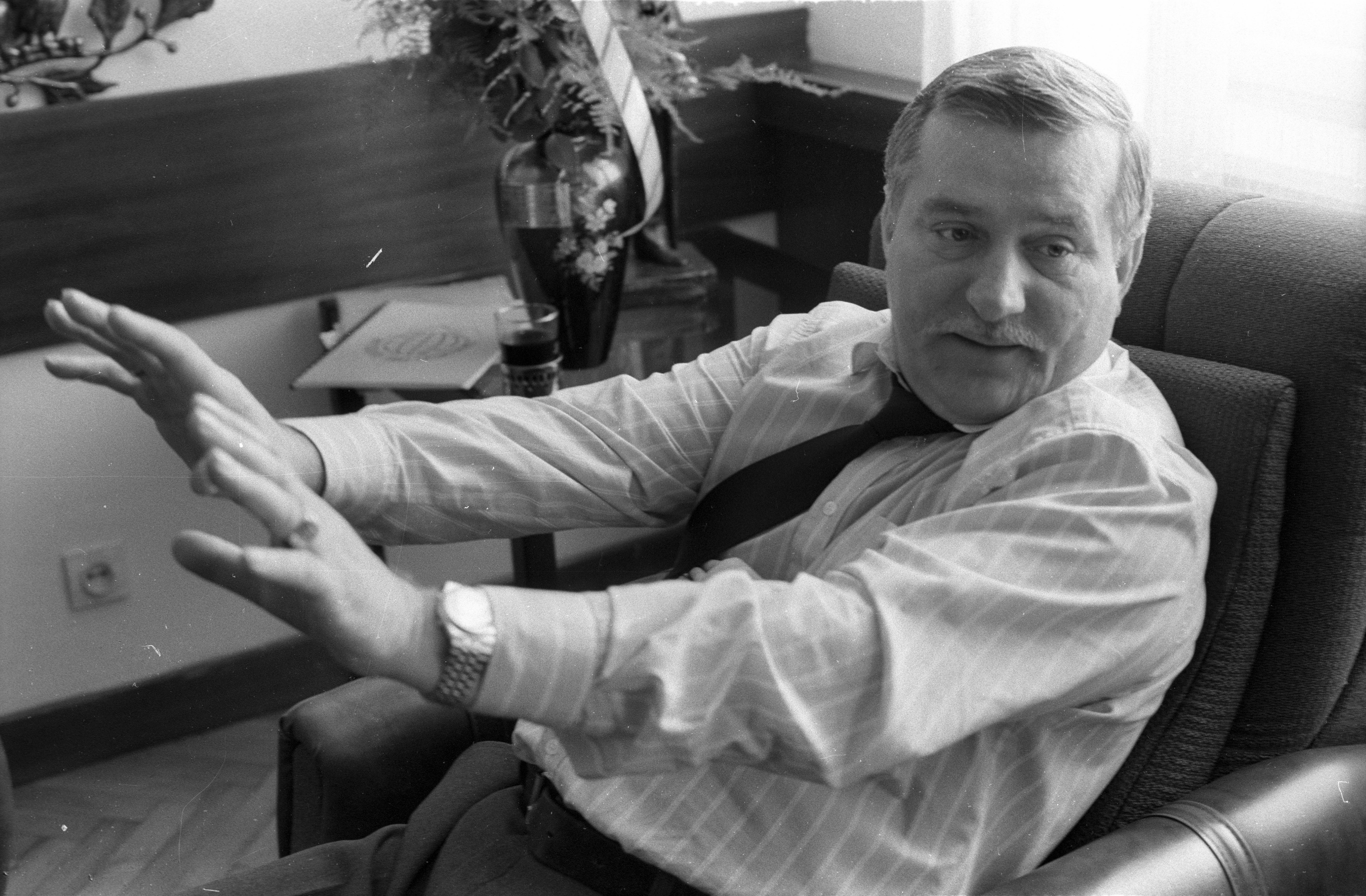 Lech Walesa, a Szolidaritás (Solidarność) szakszervezeti mozgalom egyik alapítója, későbbi államfő. Location: Poland, Gdansk Tags: celebrity, politics, Solidarity Union Title: Lech Walesa, a Szolidaritás (Solidarność) szakszervezeti mozgalom egyik alapítója, későbbi államfő.